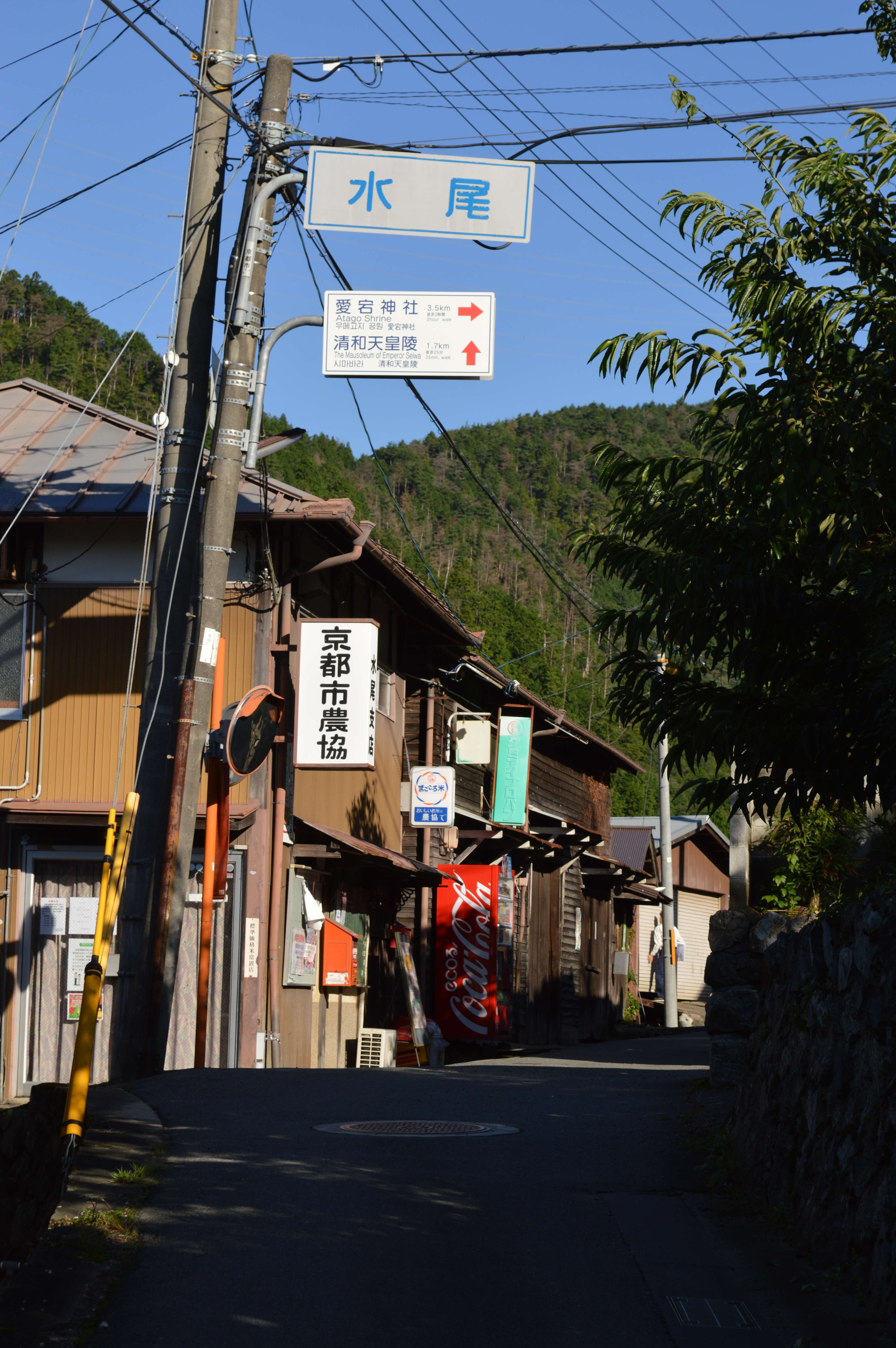 京都市右京区嵯峨水尾にある集落名漂